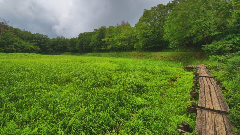 唐川湿原（鳥取県岩美町） (Karakawa wetland)